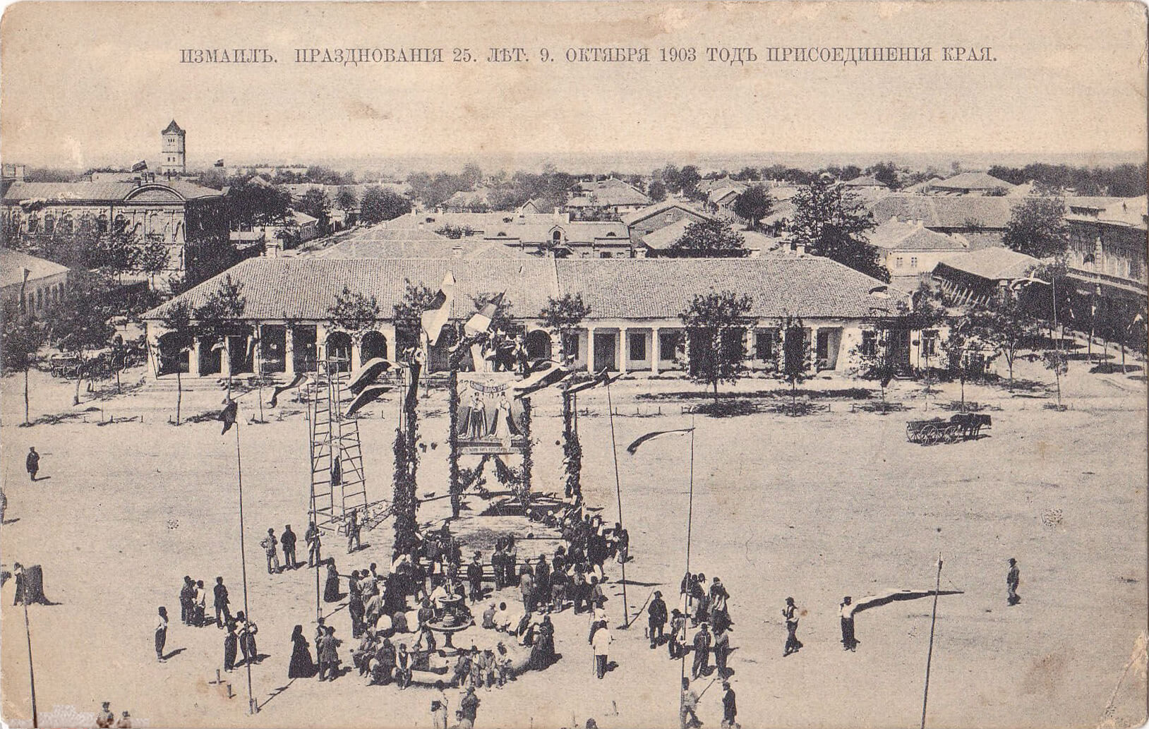 Вид на измаильский горсад с колокольни Свято-Покровского кафедрального собора